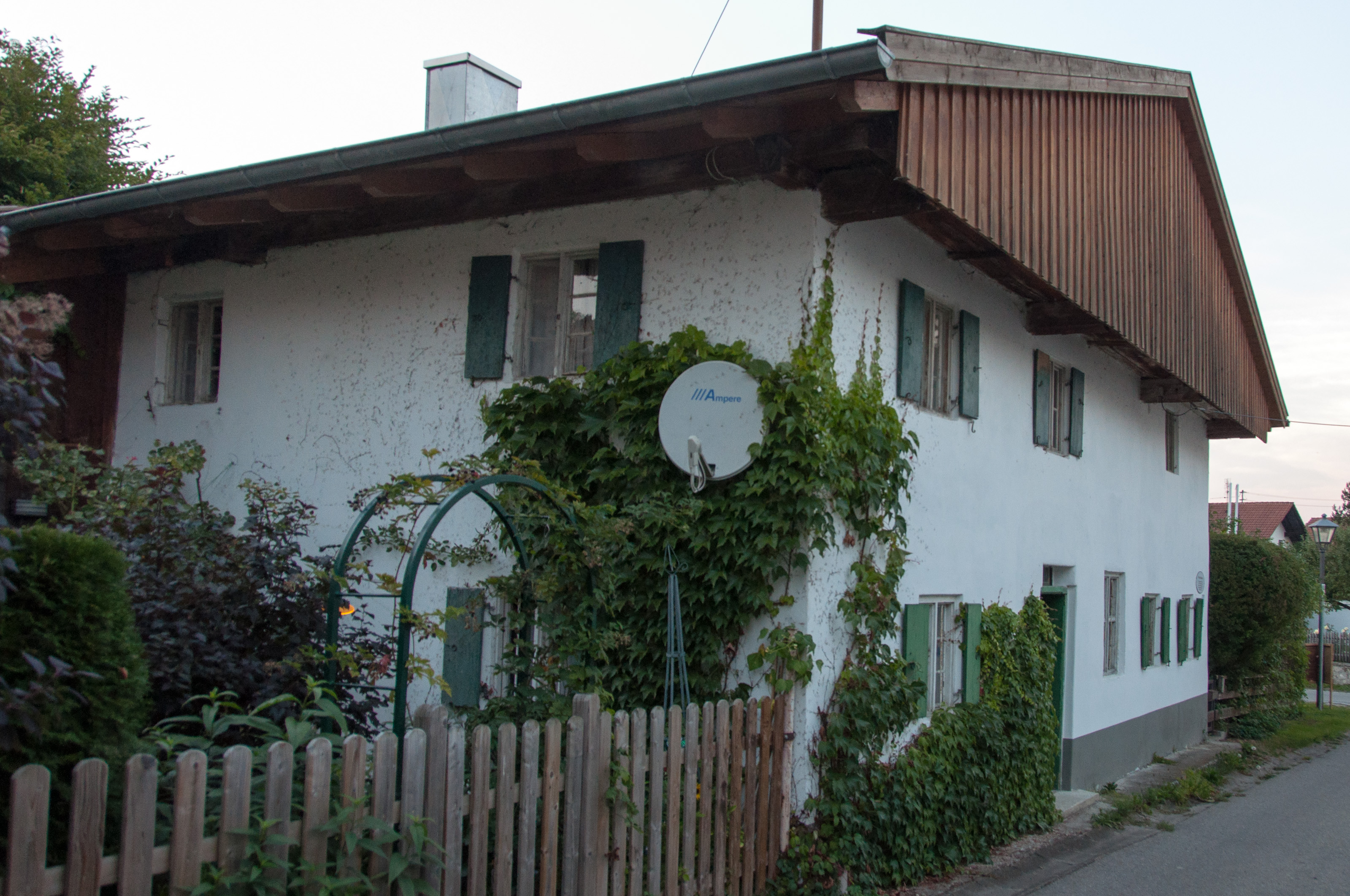 Ehemaliges Doppelhaus, Flachsatteldachbau mit verschaltem Giebel, zweite Hälfte 17. JahrhundertThis is a photograph of an architectural monument.